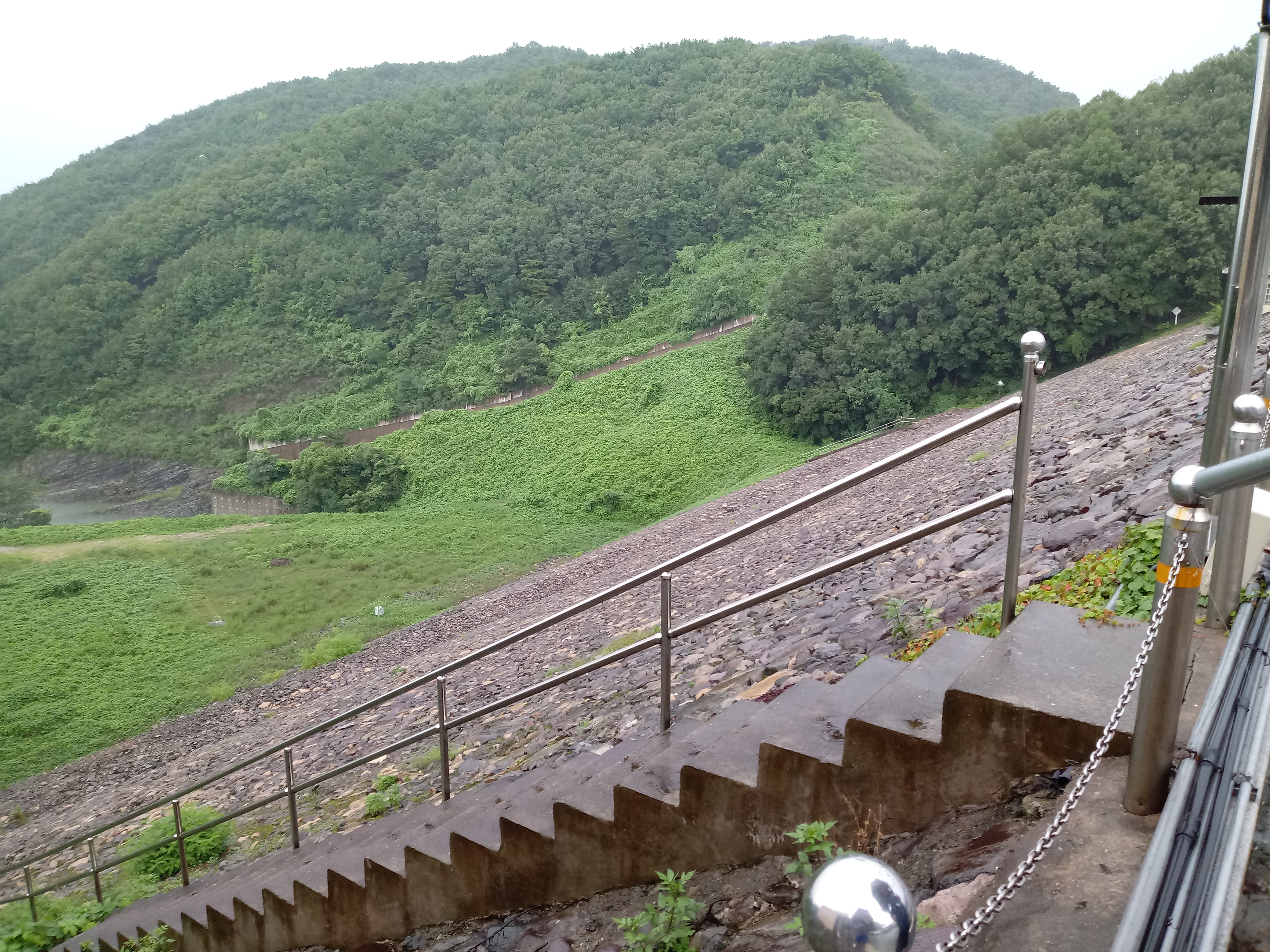 덕동댐 댐체 전면